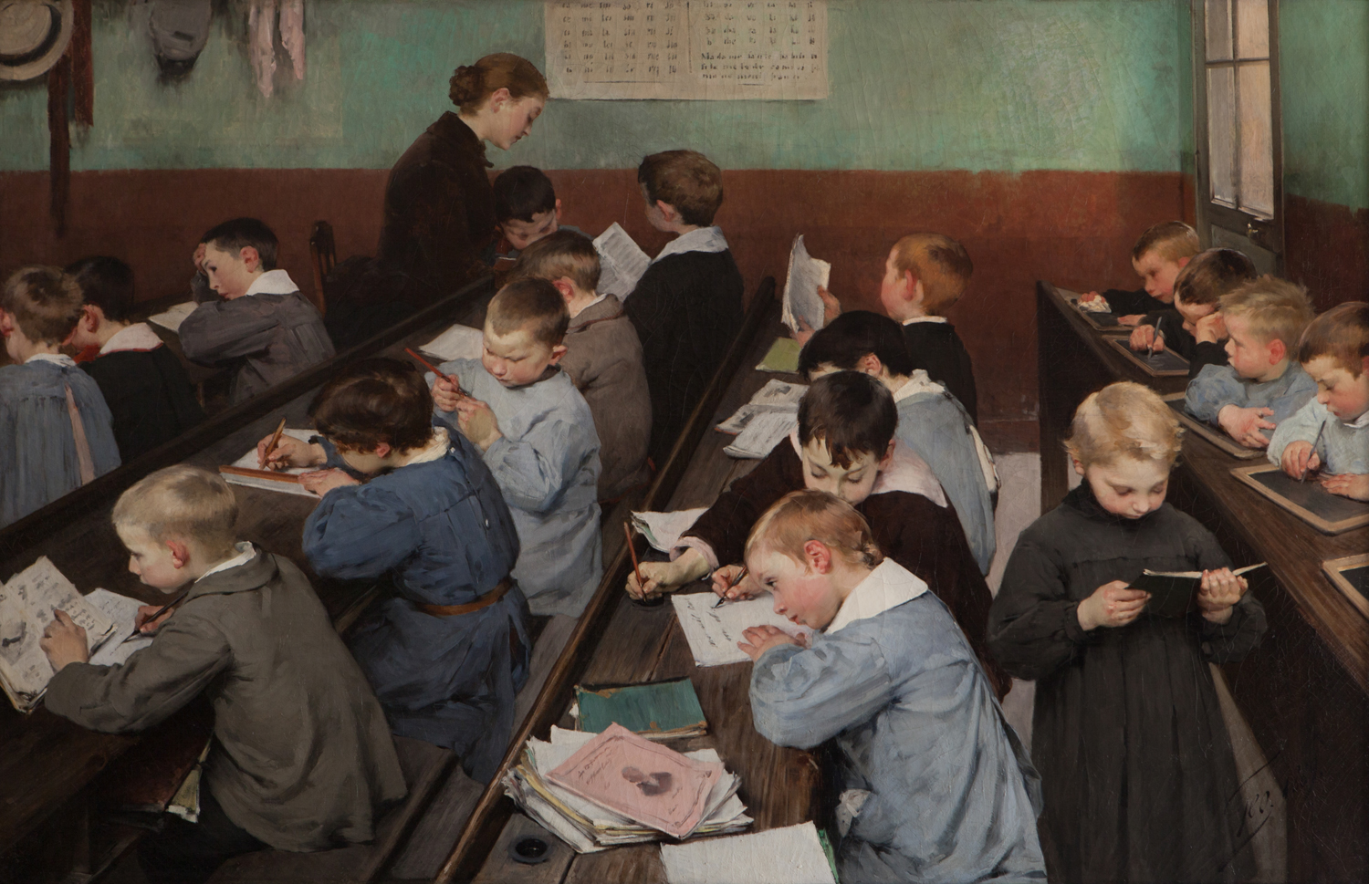 En classe, le travail des petits (référence.